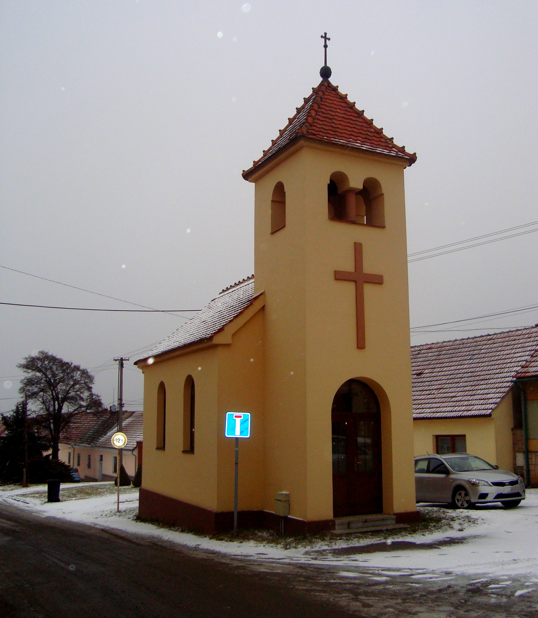 Kaplička na návsi v Javůrku